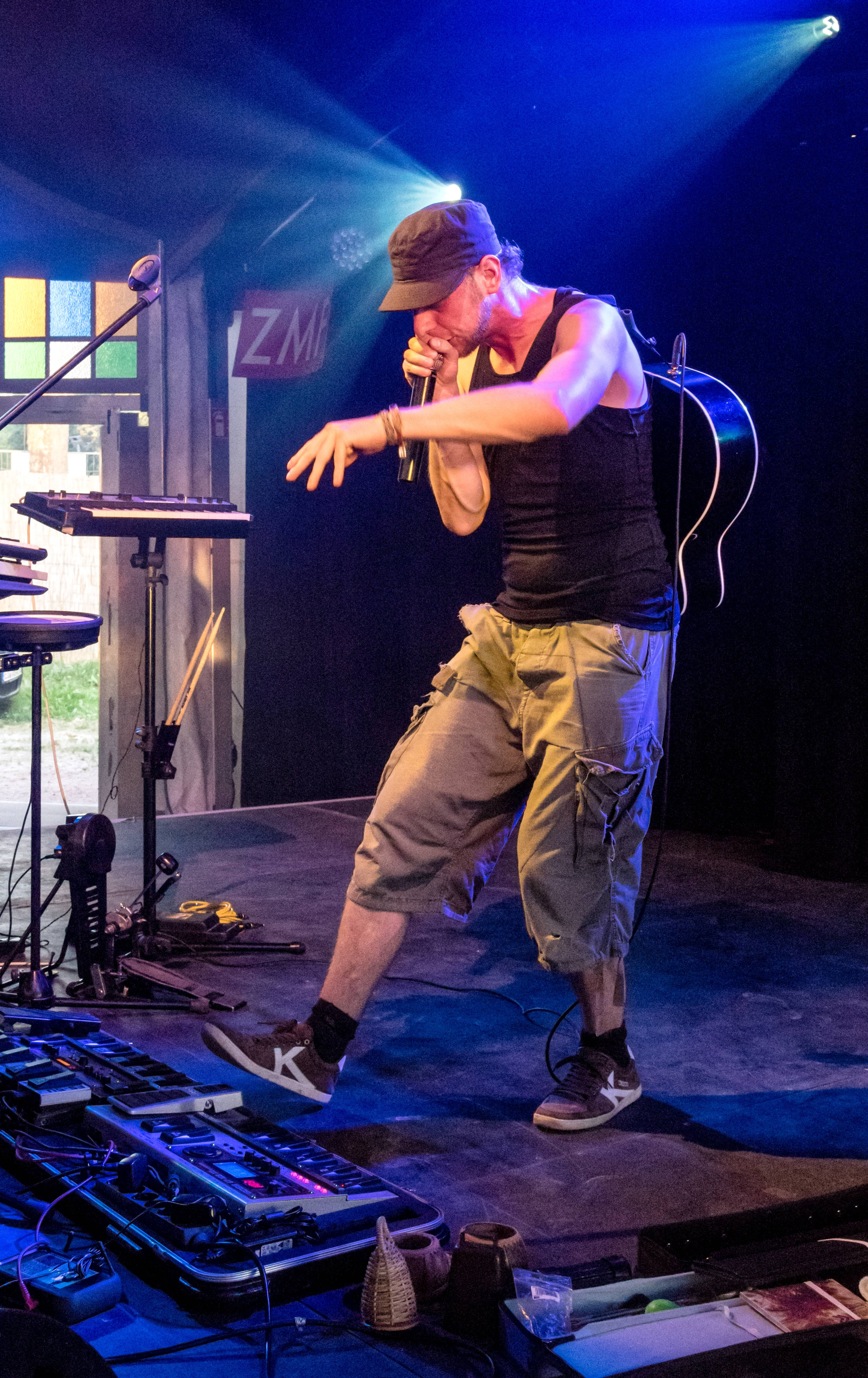 Bilder vom ZMF 2015 Konrad Kuechenmeister